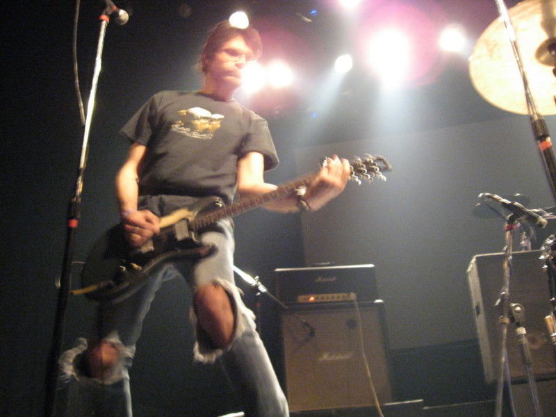 Steve Albini, en concert avec Shellac à Buenos Aires